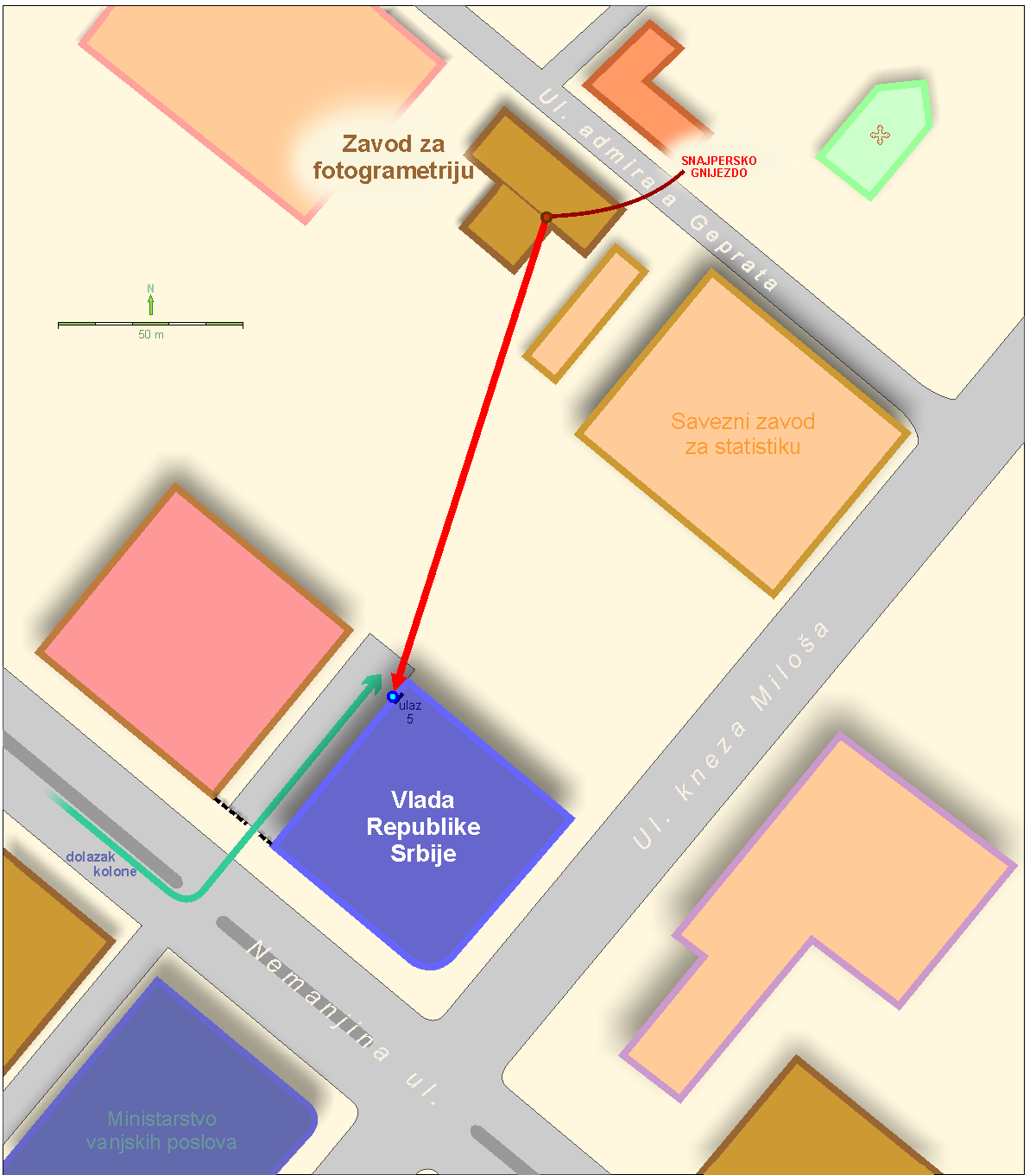 Mapa uspjelog atentata na Zorana Đinđića. Đinđić je stigao do zgrade Vlade Srbije u vozilu pod pratnjom i upucan je na ulasku u zgradu. Njegov položaj označen je plavom točkom, a položaj atentatora crvenom.